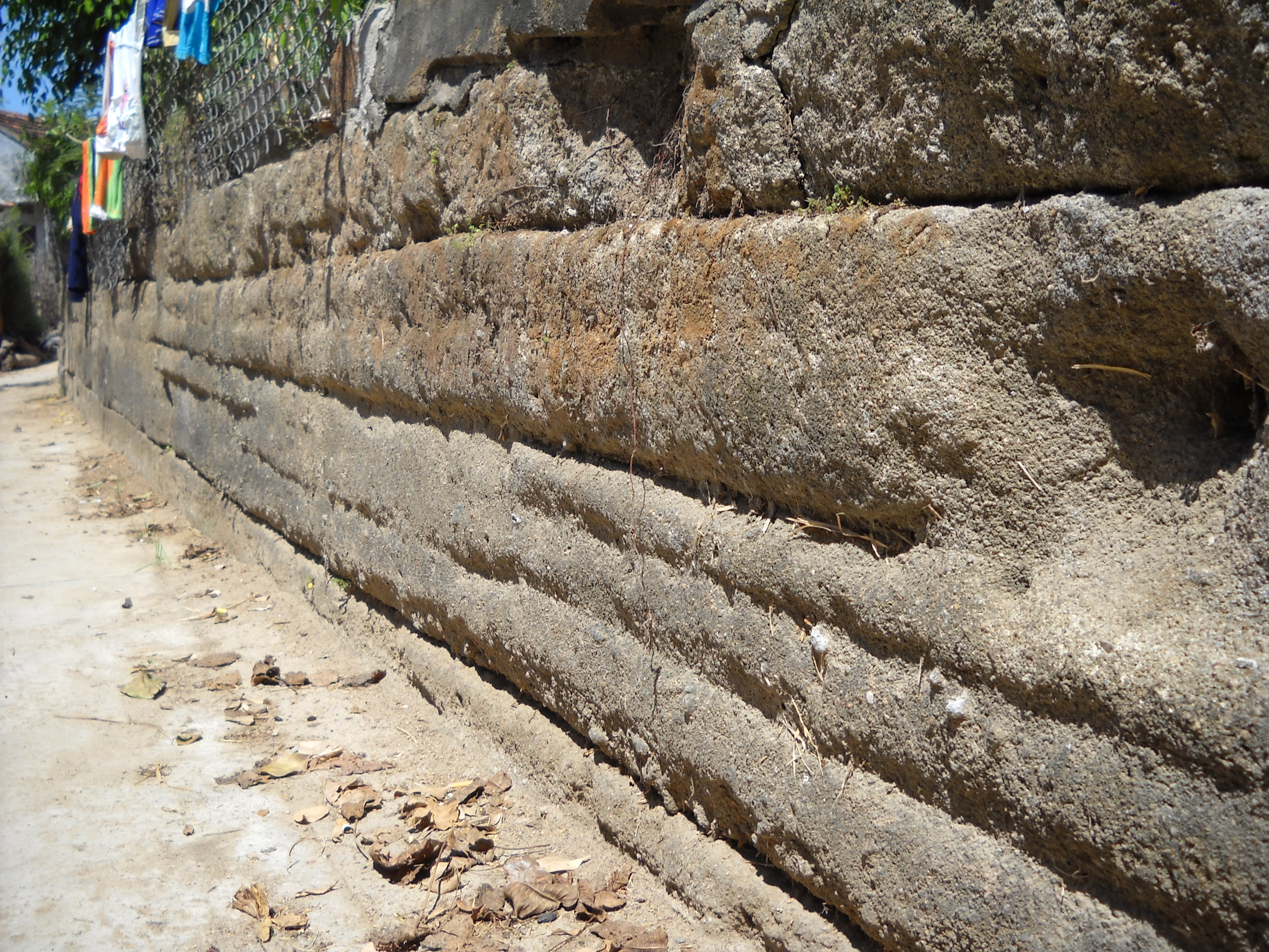 Di tích thành Thị Nại, Tuy Phong, Bình Định.